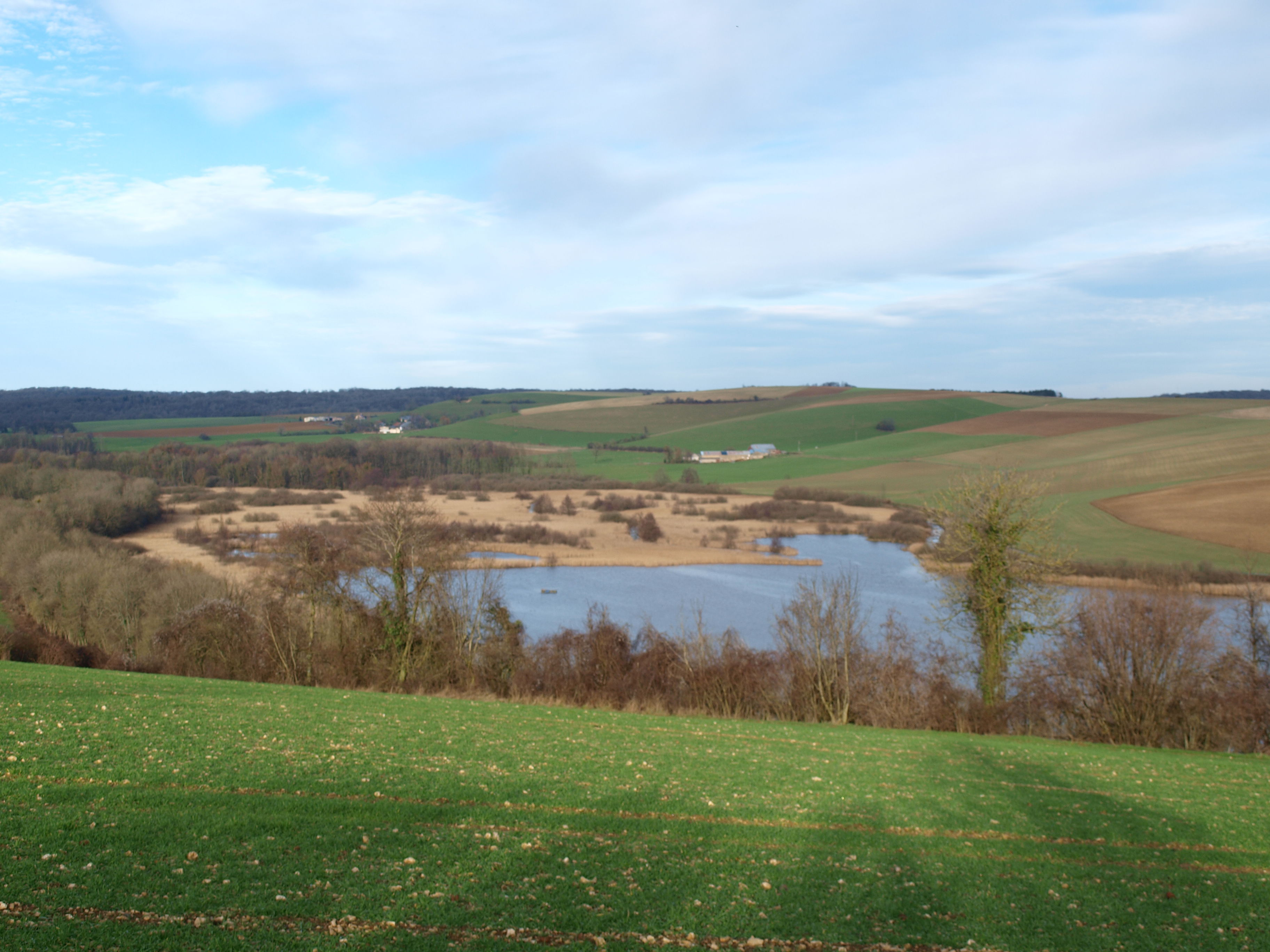 Lac de Bairon (Ardennes, France) ; le marais à l'extrémité du vieil étang.